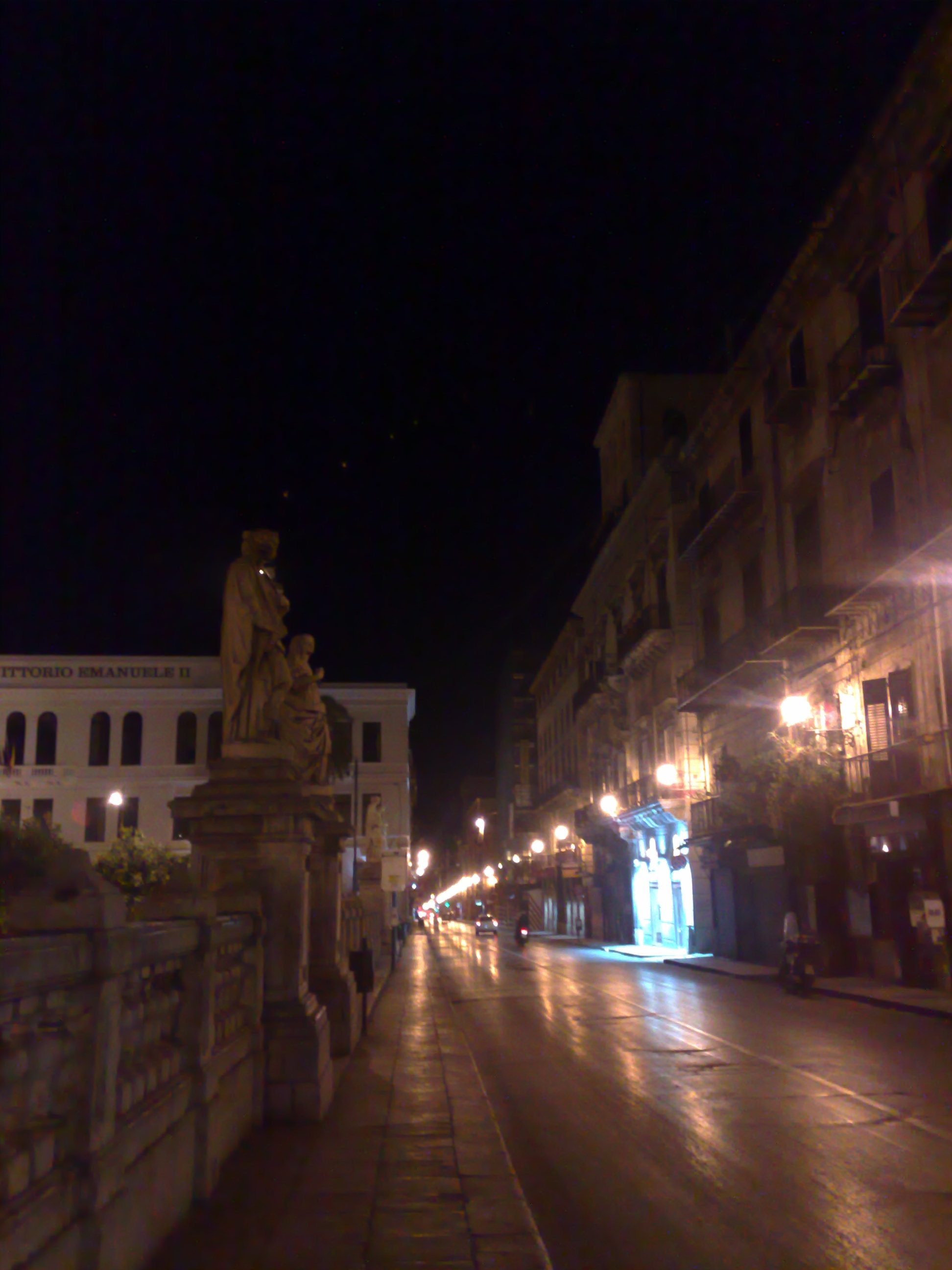 Corso Vittorio Emanuele (Palermo)